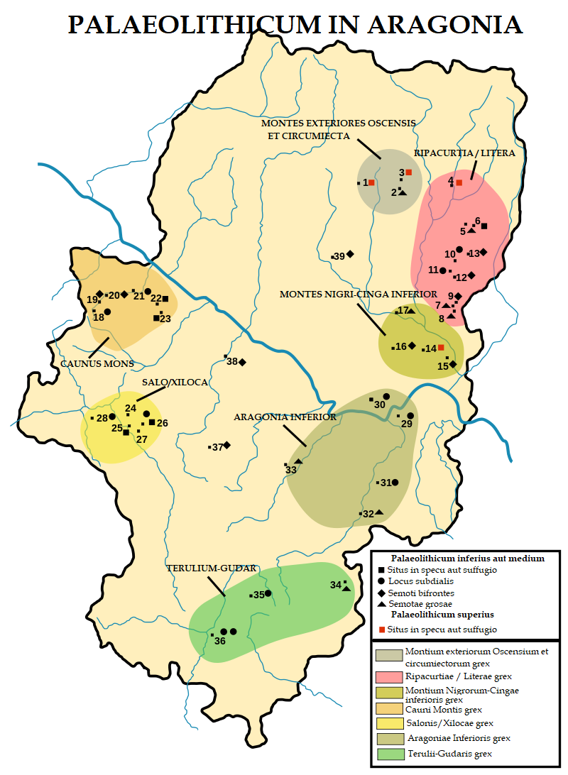 Palaeolithicum in Aragonia